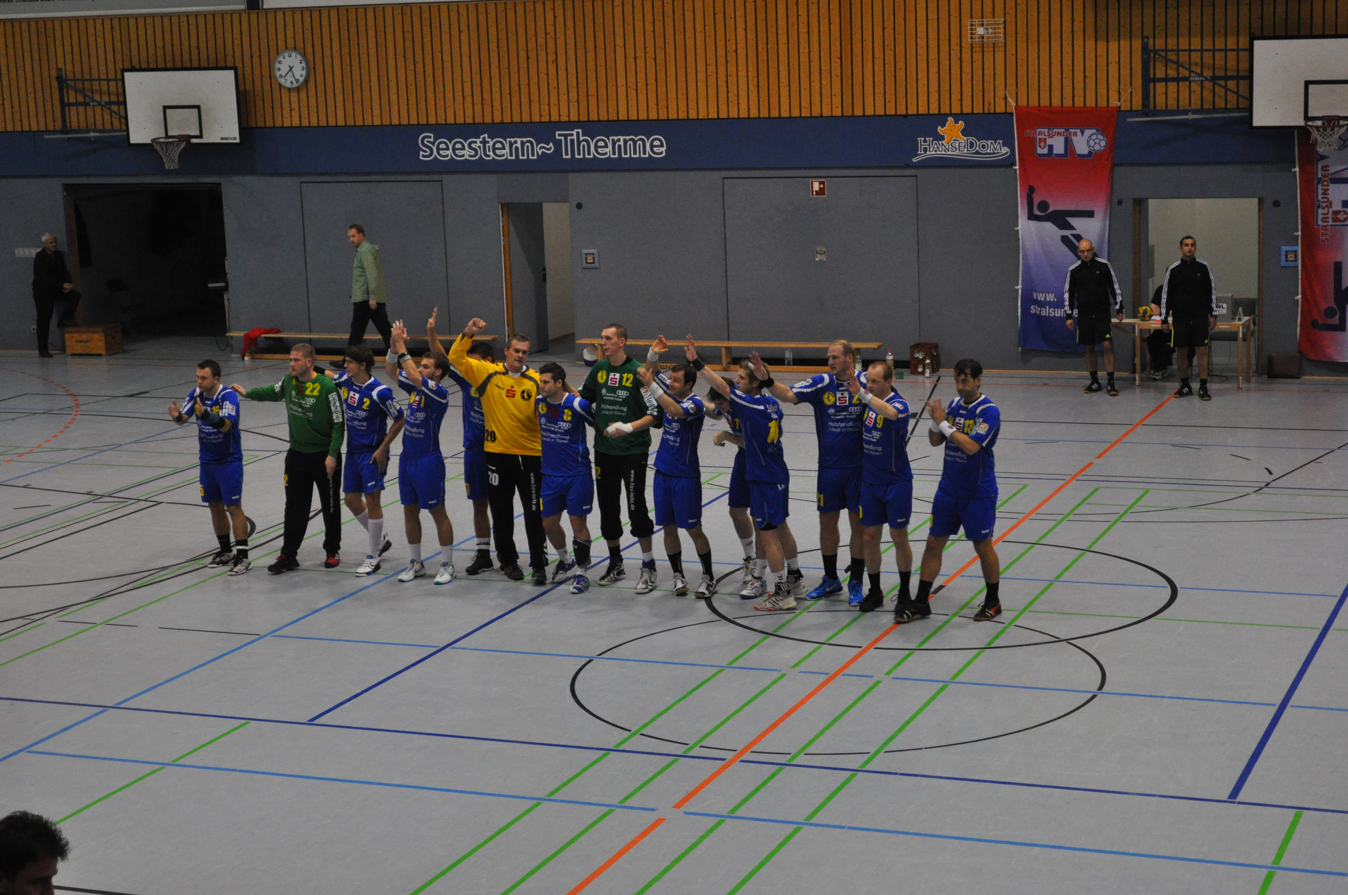 Die Mannschaft des HSV Peenetal Loitz vor dem Spiel gegen den Stralsunder HV am 30. Oktober 2010 in der Stralsunder Vogelsanghalle.